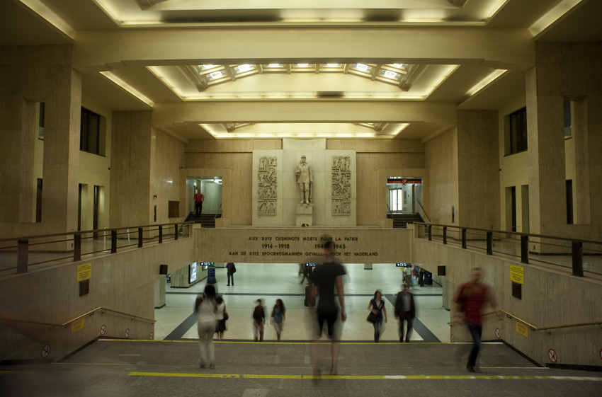 Odbavovací hala Centrálního nádraží v Bruselu, Belgie